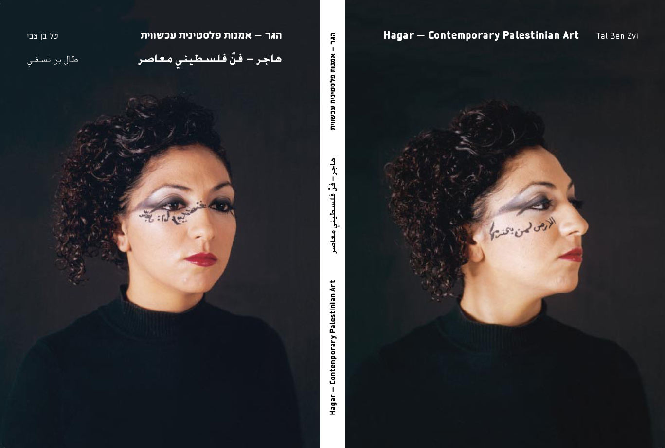 בן צבי, טל, 2006. הגר-אמנות פלסטינית עכשווית, הוצאת עמותת הגר